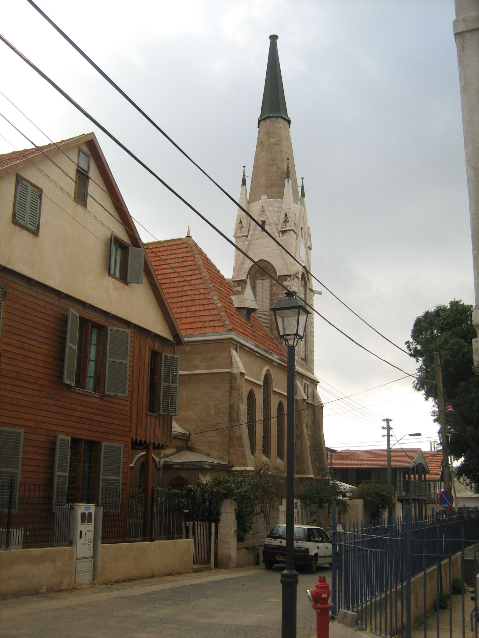 המושבה האמריקאית ביפו